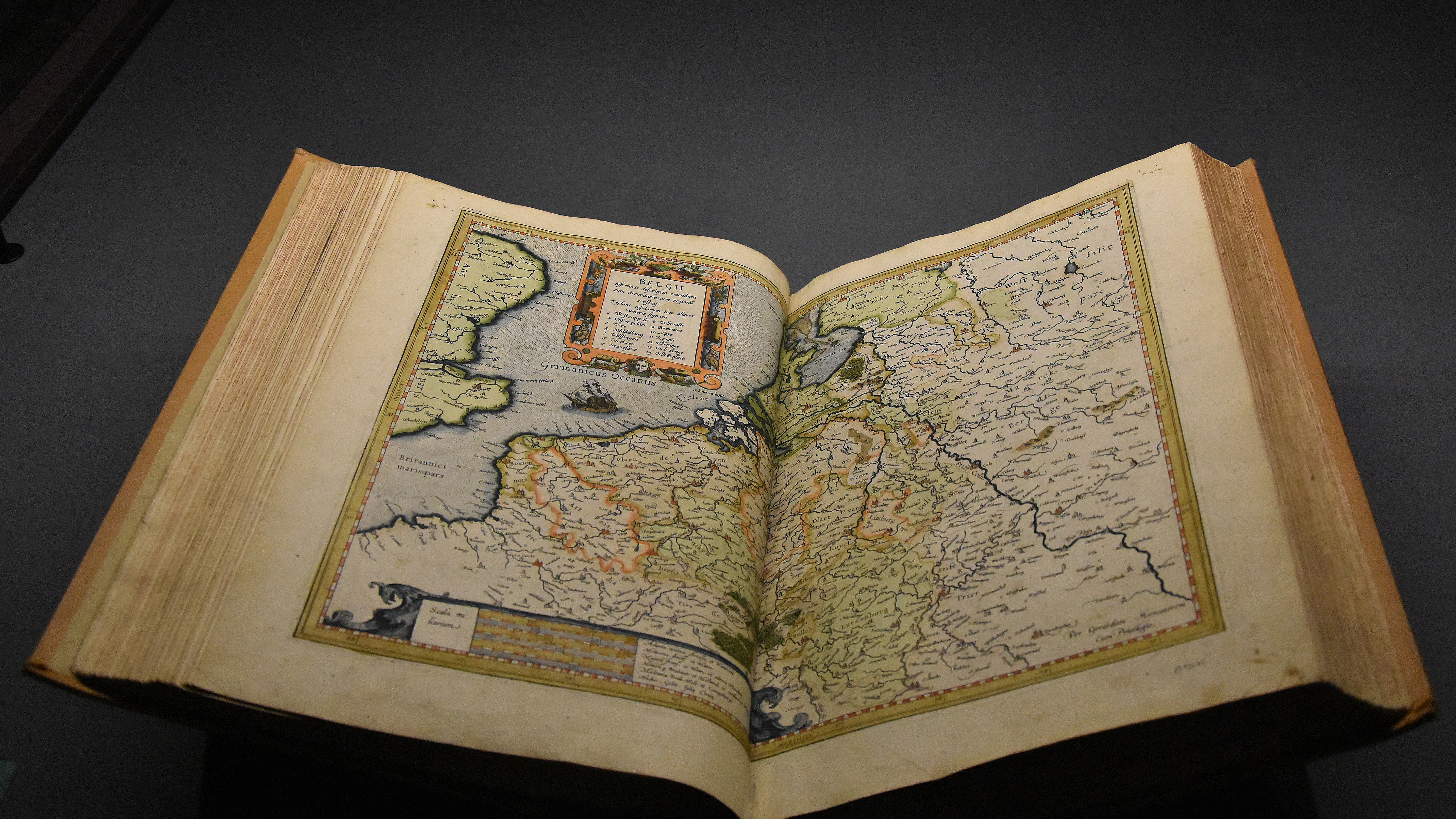 Atlas uit 1595 van Gerard Mercator, uitgegeven na zijn dood. Het is de eerste volledige editie van zijn atlas. Ze omvat een biografie van Mercator, enkele aan hem opgedragen gedichten, zijn traktaat over de schepping van de wereld en 107 kaarten. Dit algemene werk over kosmogonie handelt over de wereld en de vijf continenten en bevat gedetailleerde kaarten van Europa, land voor land en streek per streek. De kaarten werden gedrukt met behulp van koperplaten en werden vervolgens met de hand ingekleurd. This is a file created at the museum: Royal Library of Belgium in Brussels